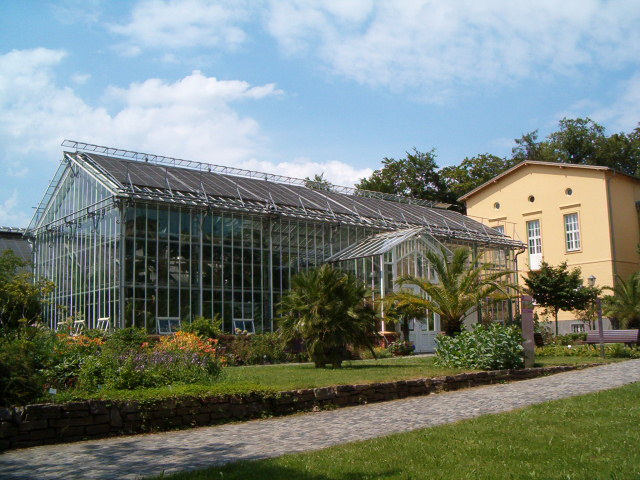 Botanical Gardens Potsdam, Germany Botanischer Garten Potsdam, Gewächshäuser Eingang Picture taken by: User:BotBln Date: 07 2006